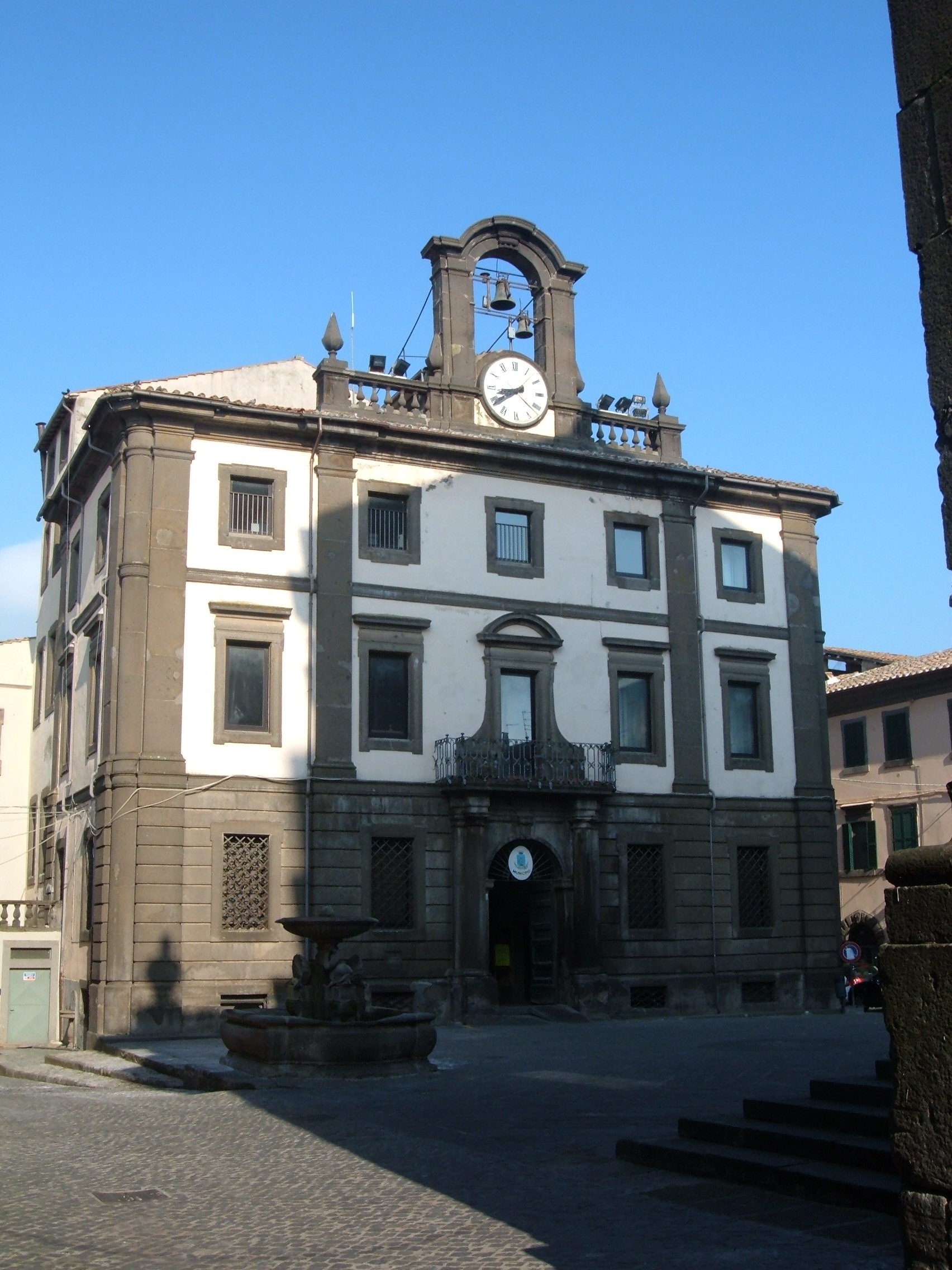 Palazzo comunale di Vetralla, opera dell’architetto Filippo Barigioni (1731).